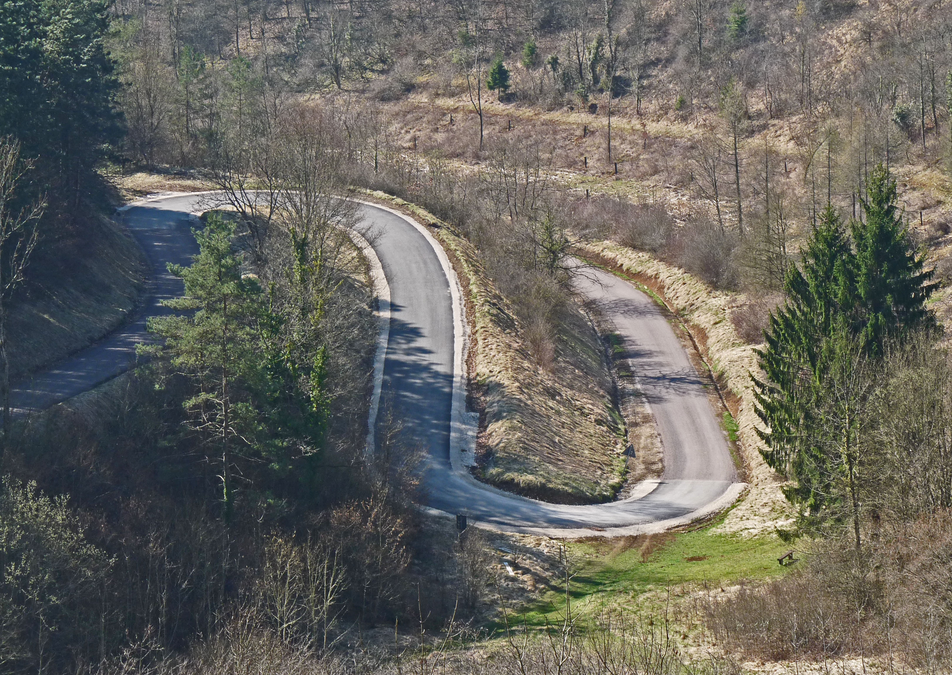 Lacets de Mélaire près de Poissons (Haute-Marne).